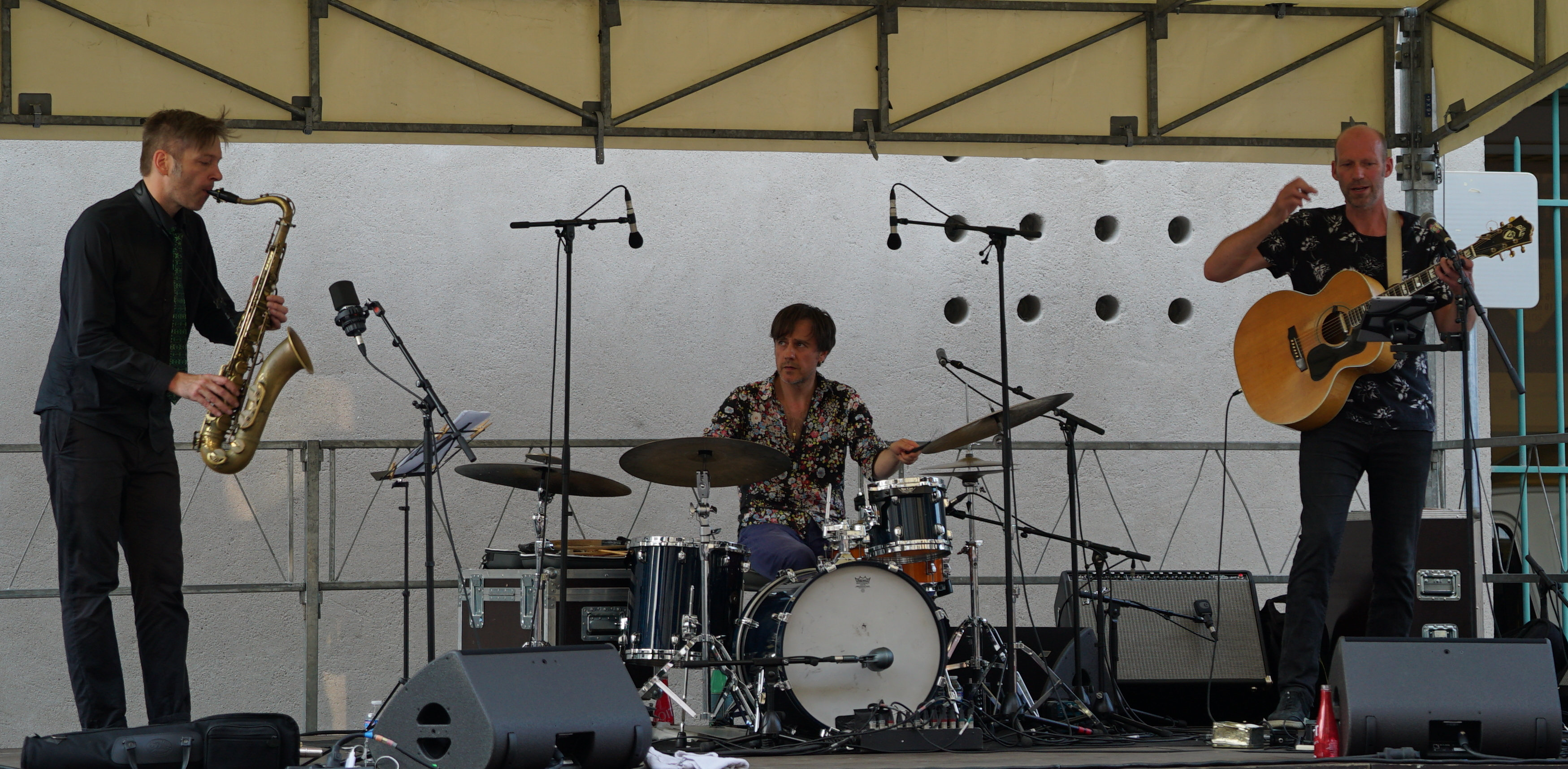 en cocncert au boulingrin.